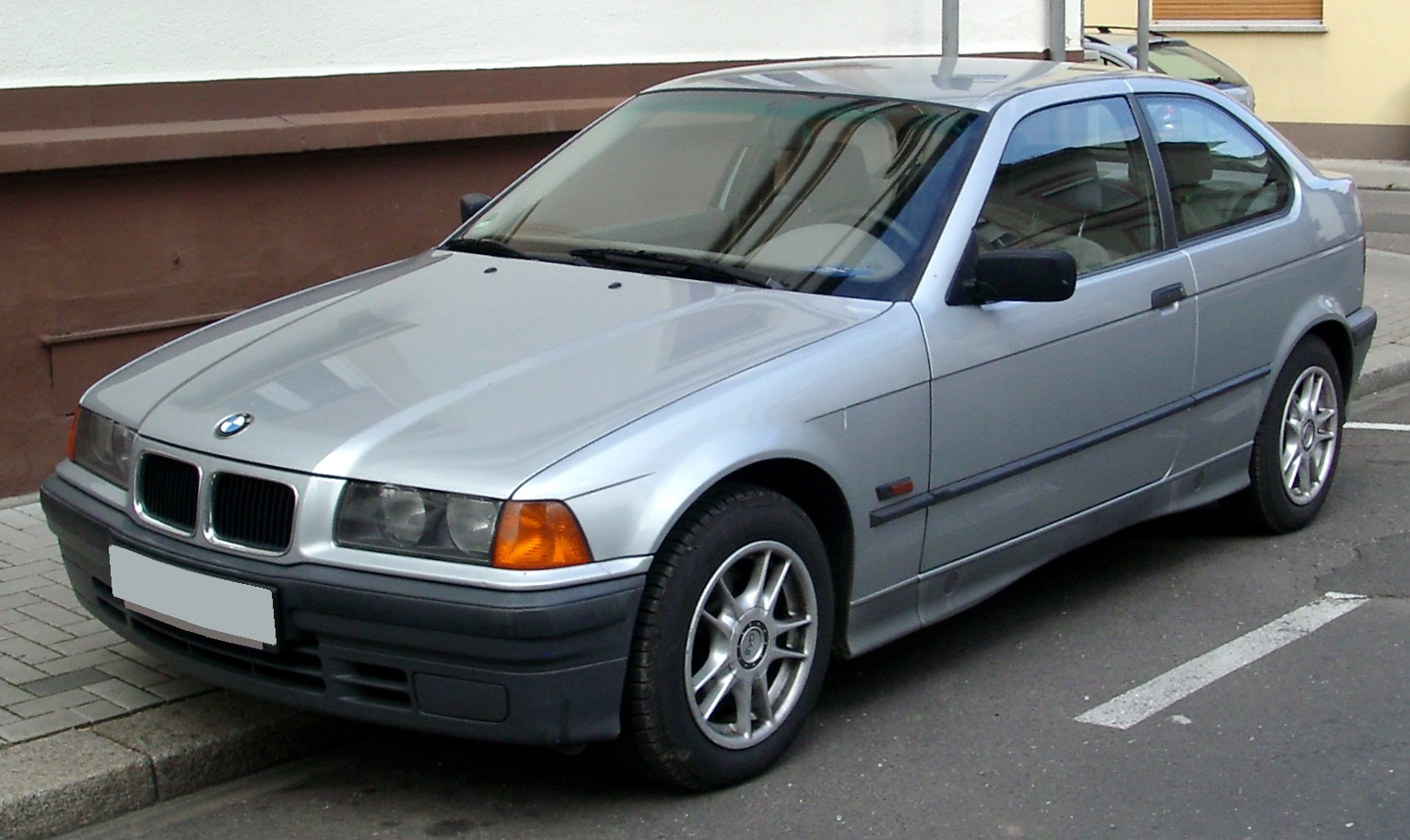 BMW E 36 Compact